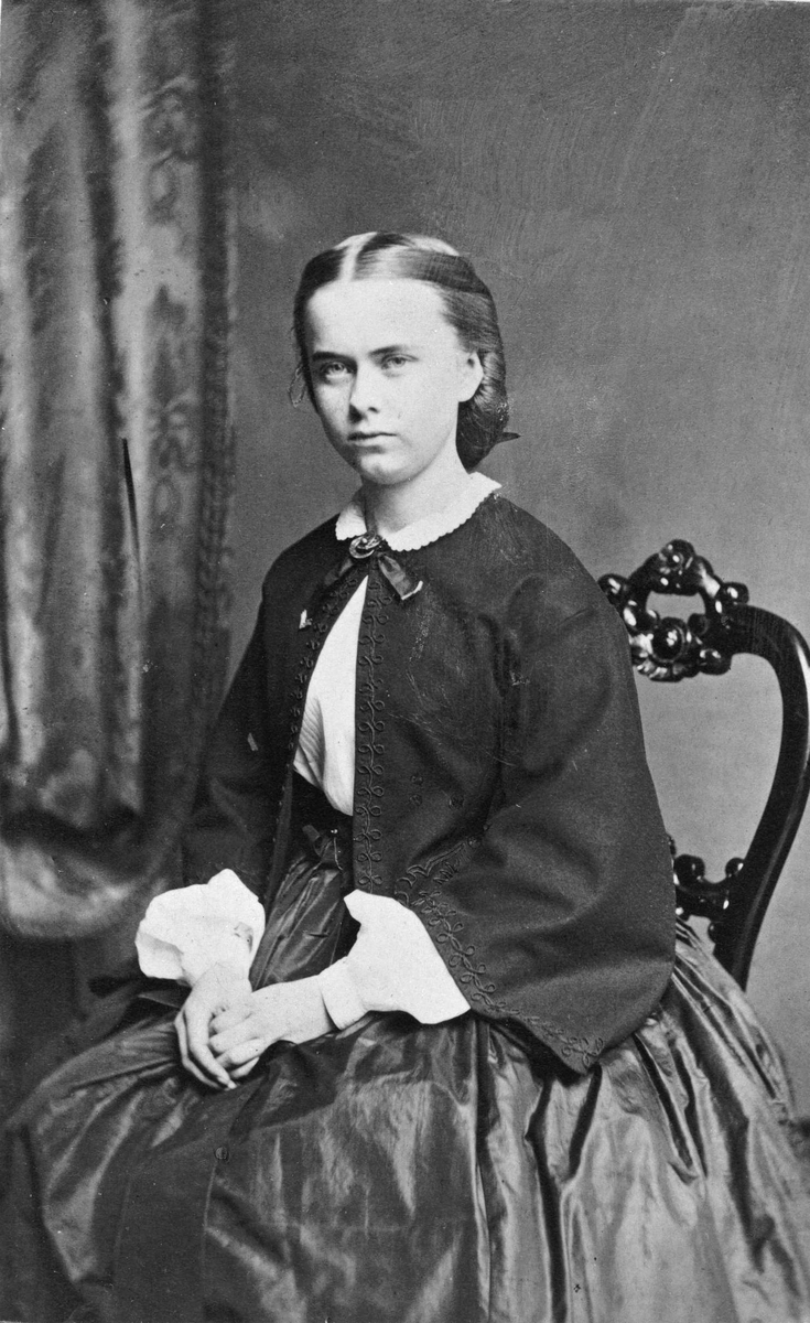 Ragna Nielsen, født Ullmann, var en norsk pedagog og kvinnesaksforkjemper. Hun var født i 1845 og døde i 1924. Dette bildet er tatt i 1865.